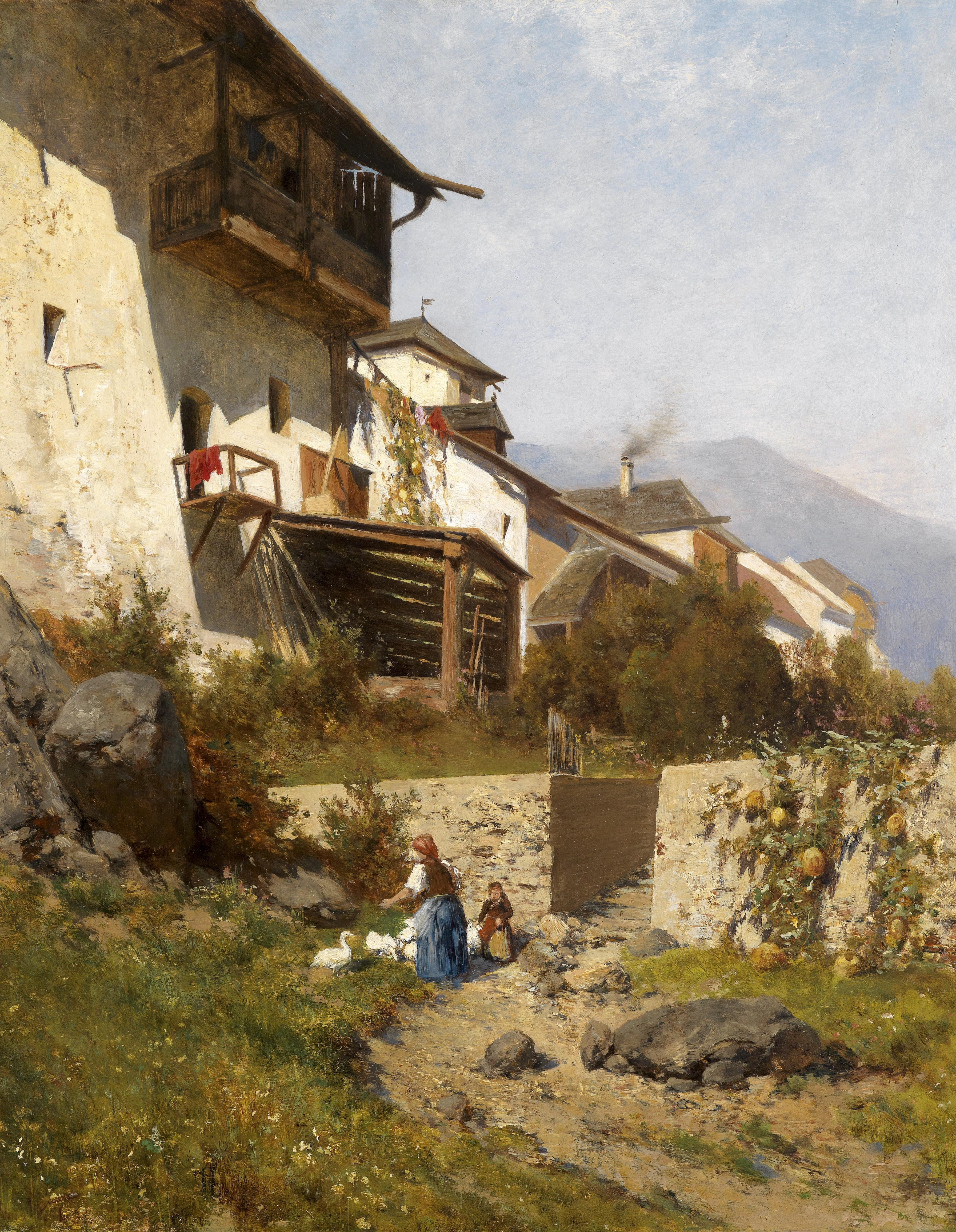 Motiv aus Murau. Steiermarkt